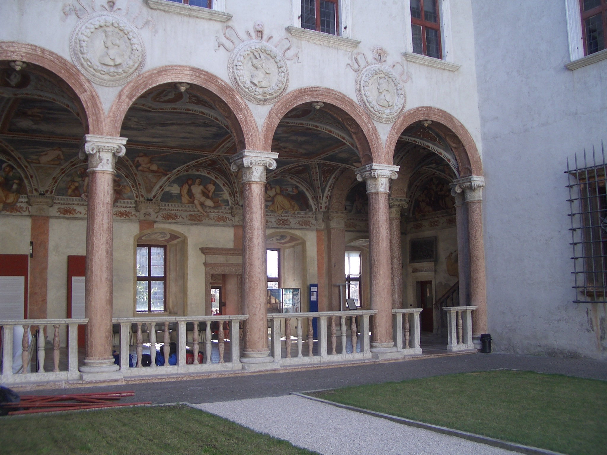 Castello del Buonconsiglio, Trento. View of the so called Loggia del Romanino